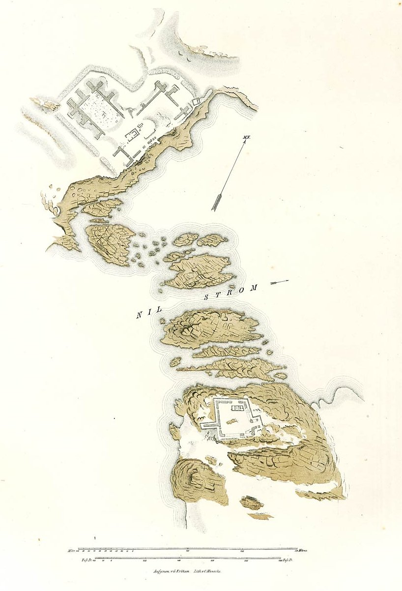 Denkmaeler aus Aegypten und Aethiopien nach den Zeichnungen der von Seiner Majestät dem Koenige von Preussen, Friedrich Wilhelm IV., nach diesen Ländern gesendeten, und in den Jahren 1842–1845 ausgeführten wissenschaftlichen Expedition auf Befehl Seiner Majestät - Situationsplan der alten Bauanlagen von Semna und Kumma